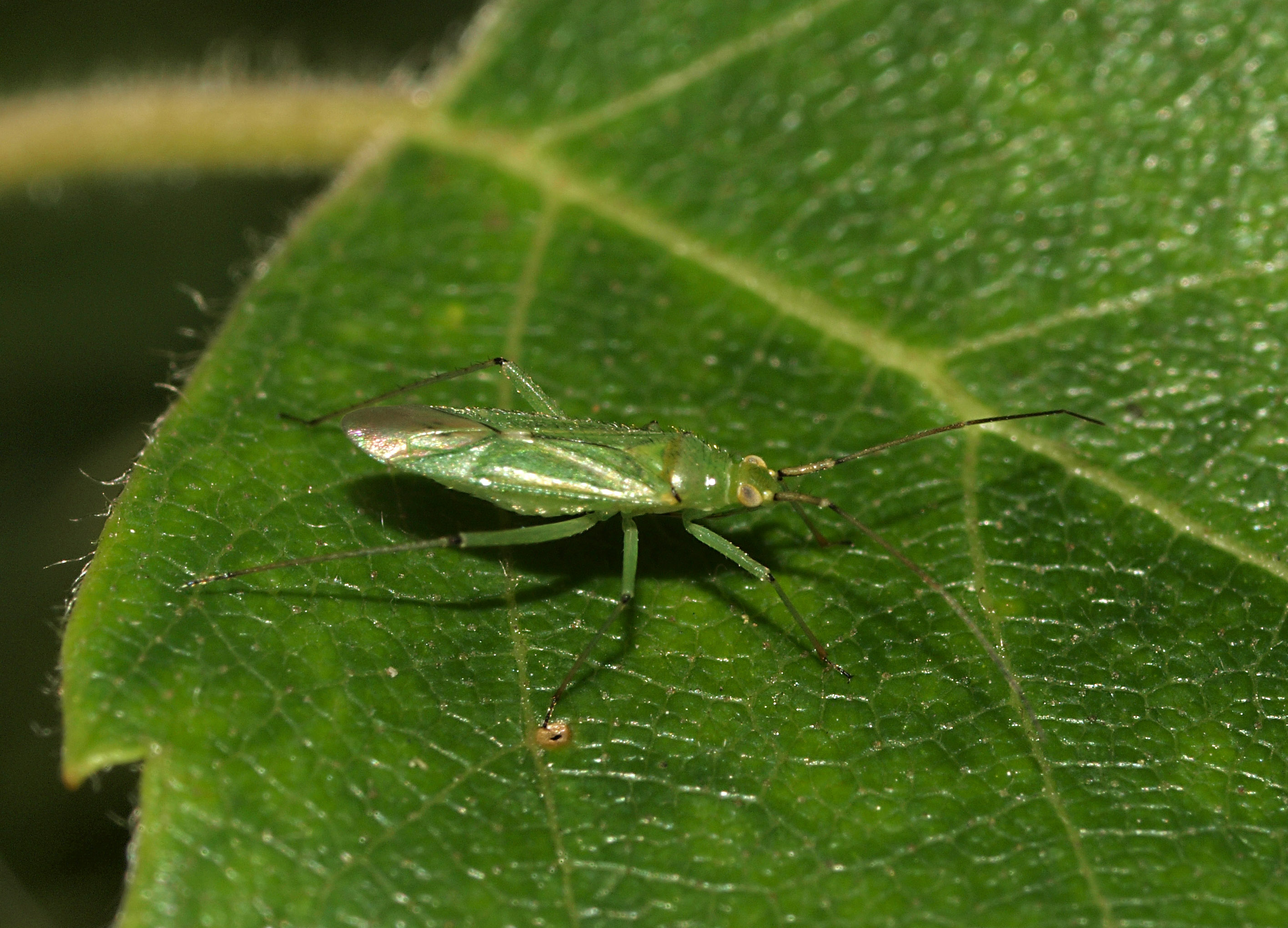 Sortknæet blomstertæge fundet på Vorte-birk.